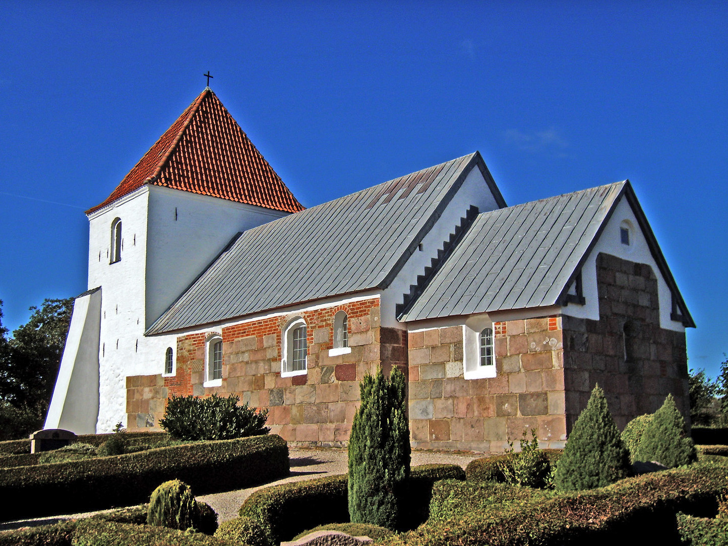 fra sydøst